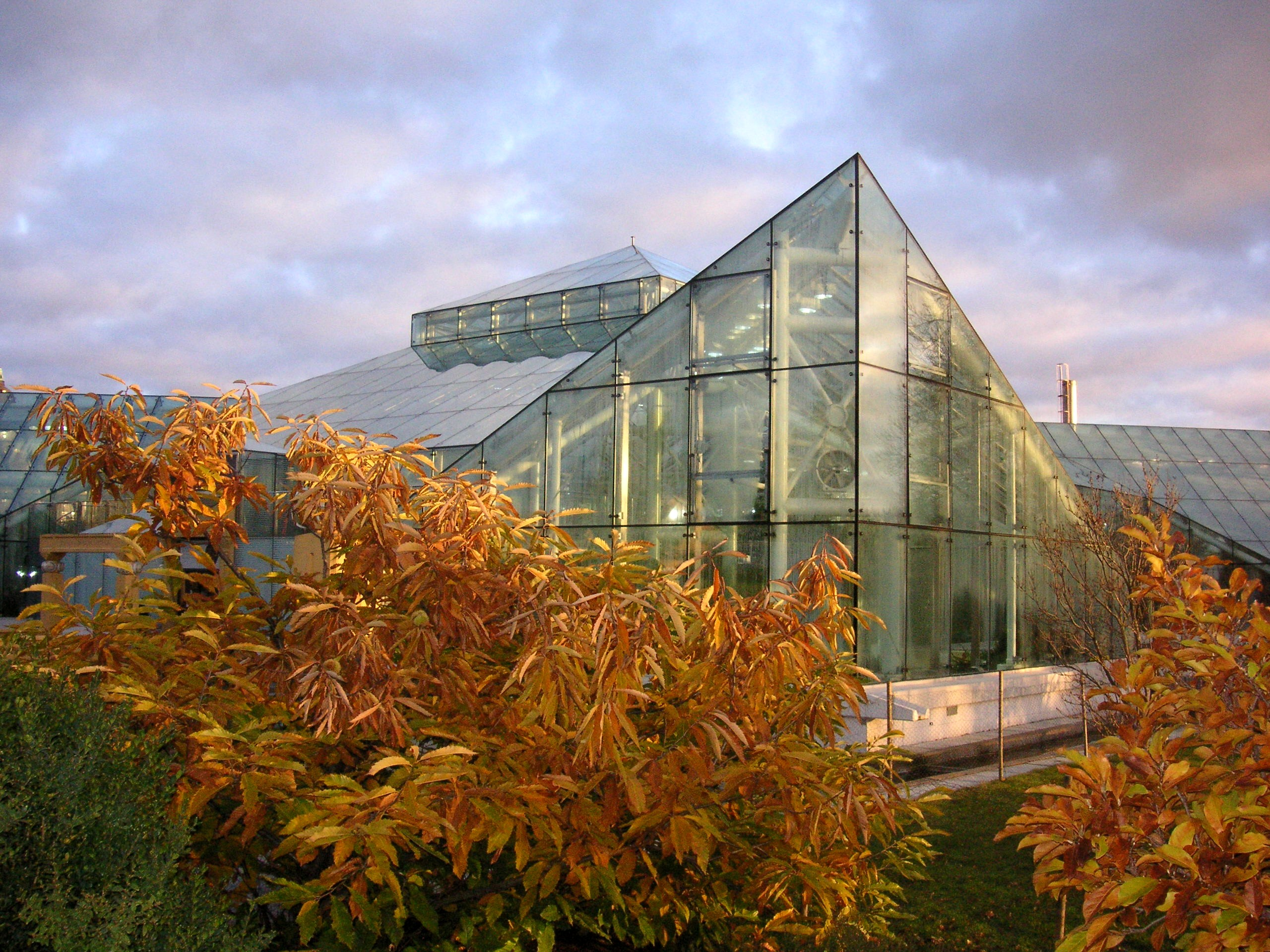 Bergianska botaniska trädgården i Stockholm